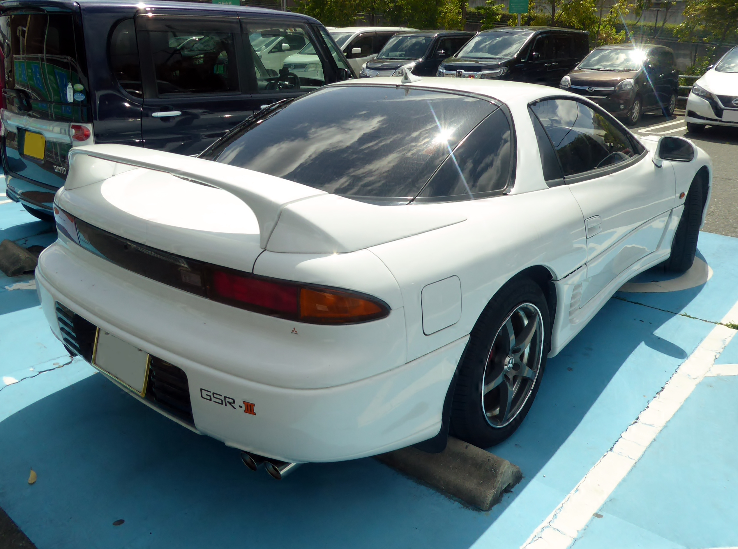 E-Z16A型三菱・GTOをリアから撮影。